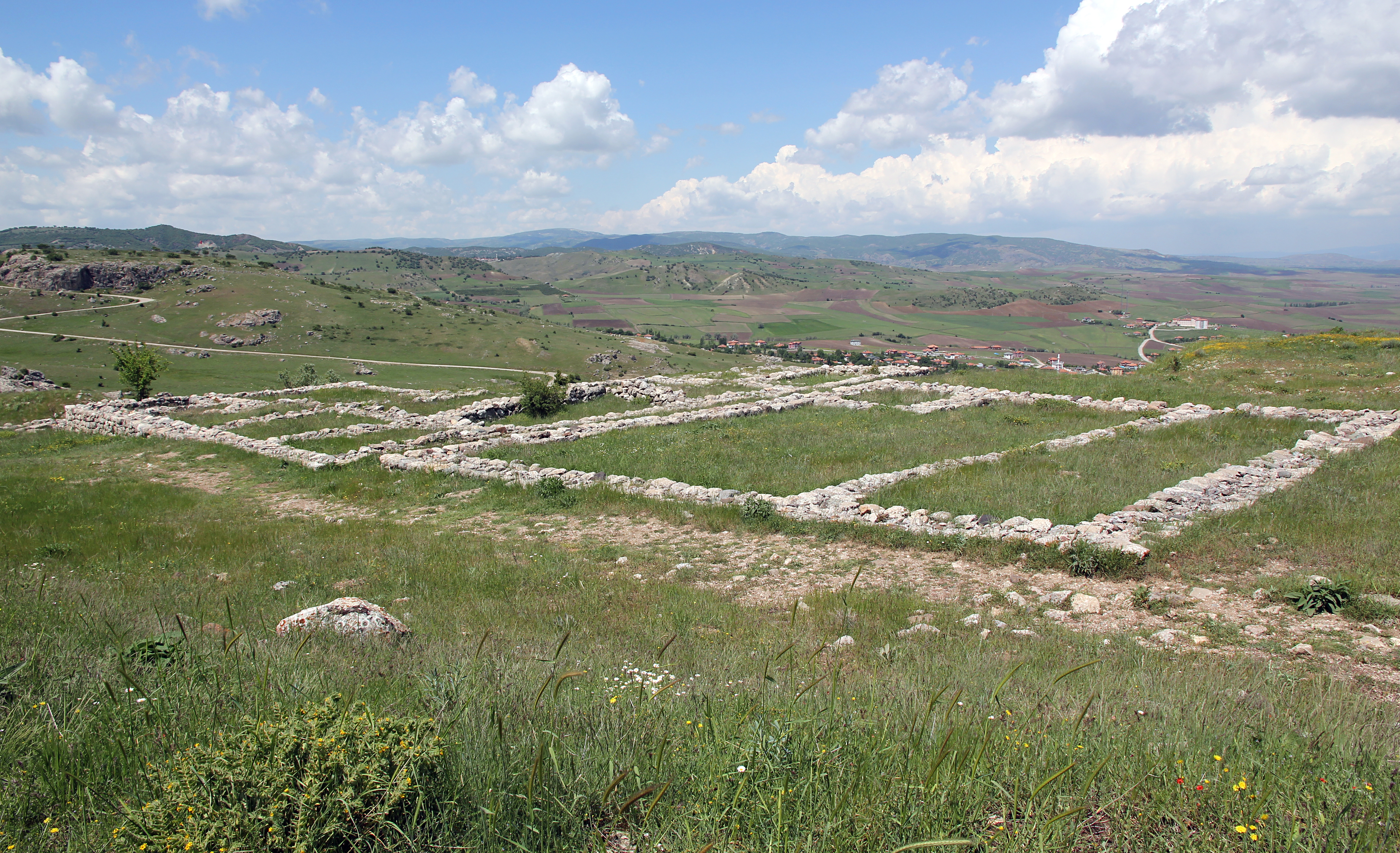 Büyükkale, die Zitadelle der hethitischen Hauptstadt Hattuša bei Boğazkale, Zentraltürkei, Gebäude M und N